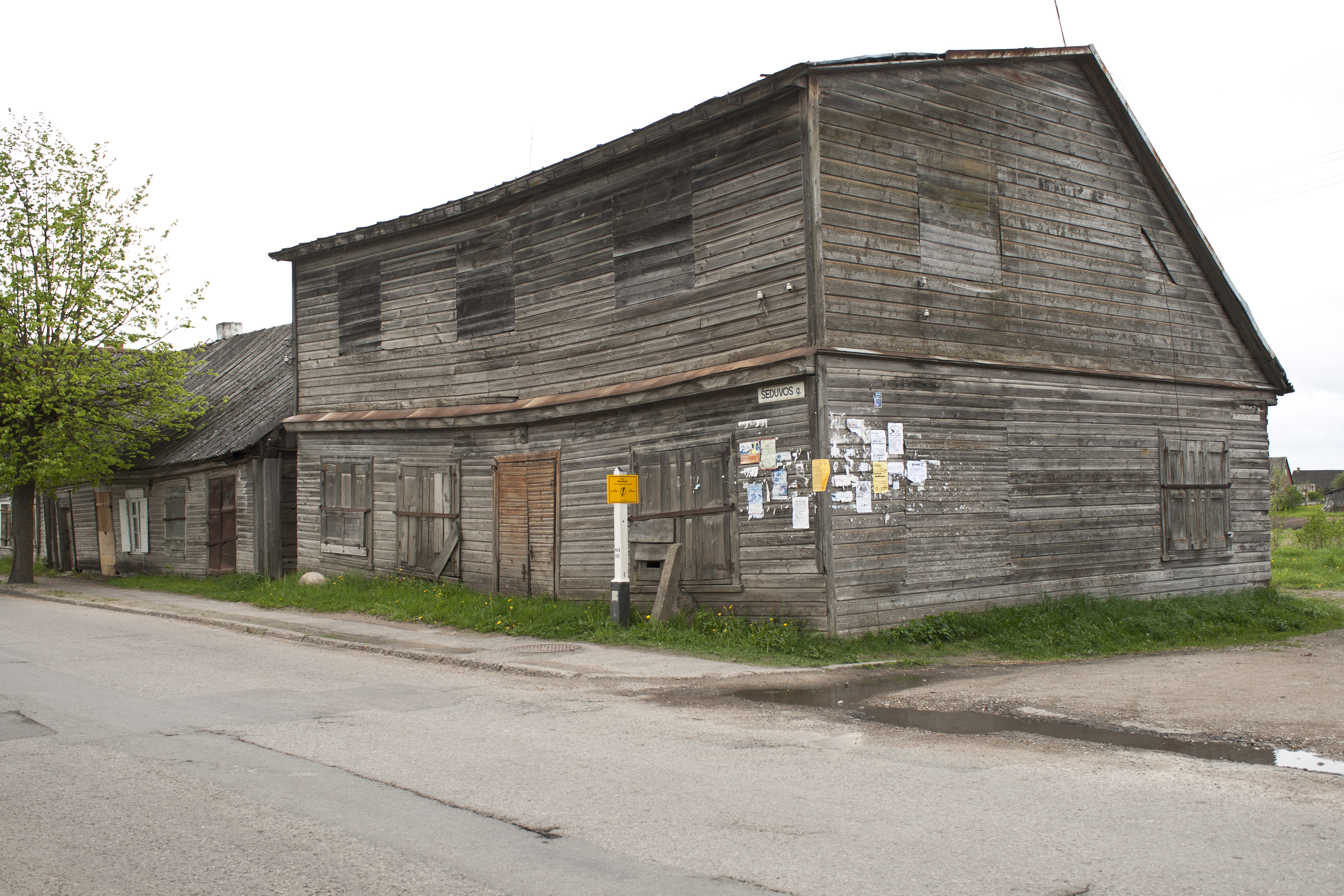 Rozalimas synagogue